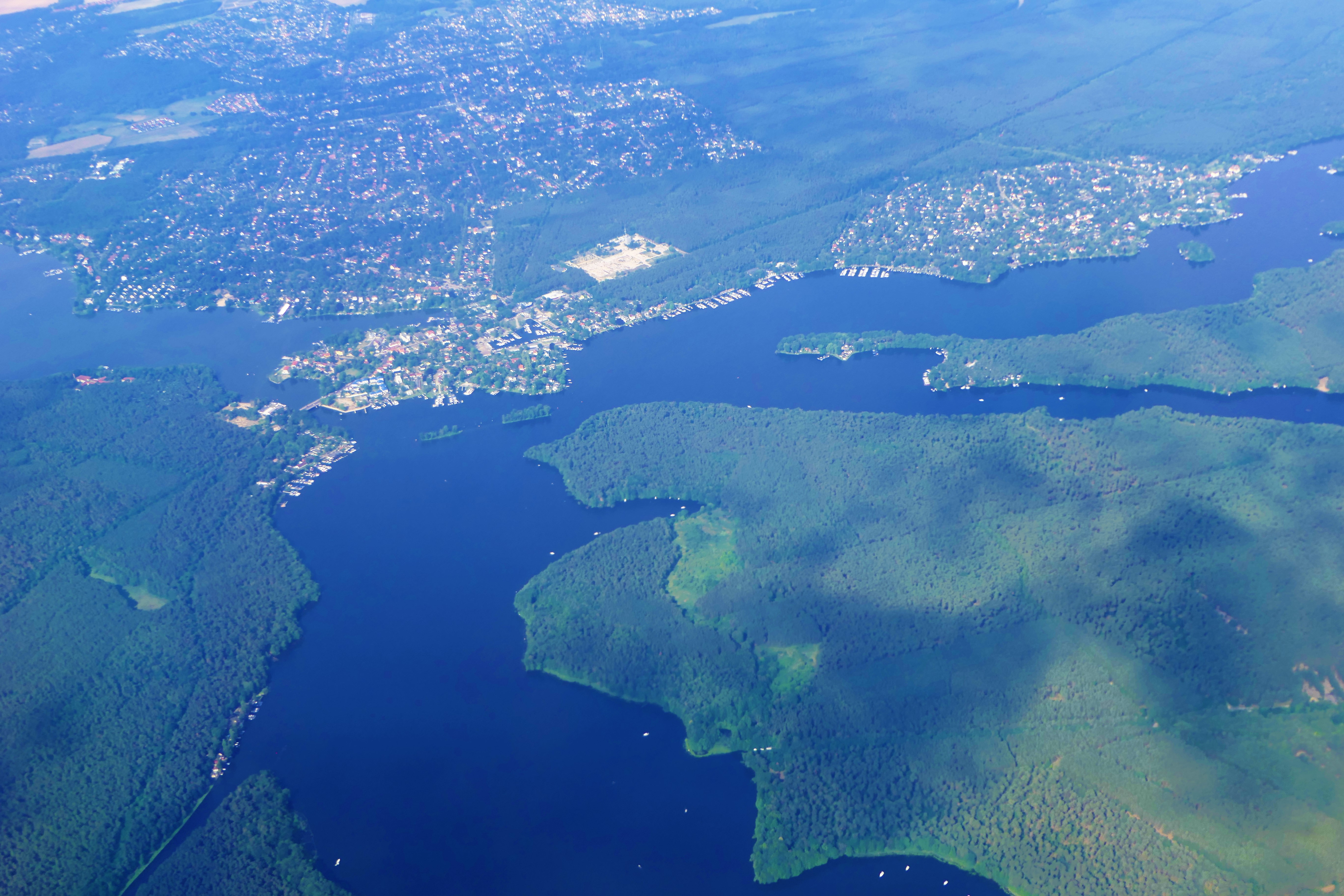 Luftbild von Berlin-Schmöckwitz - Alt-Schmöckwitz und Karolinenhof, im Hintergrund: Eichwalde